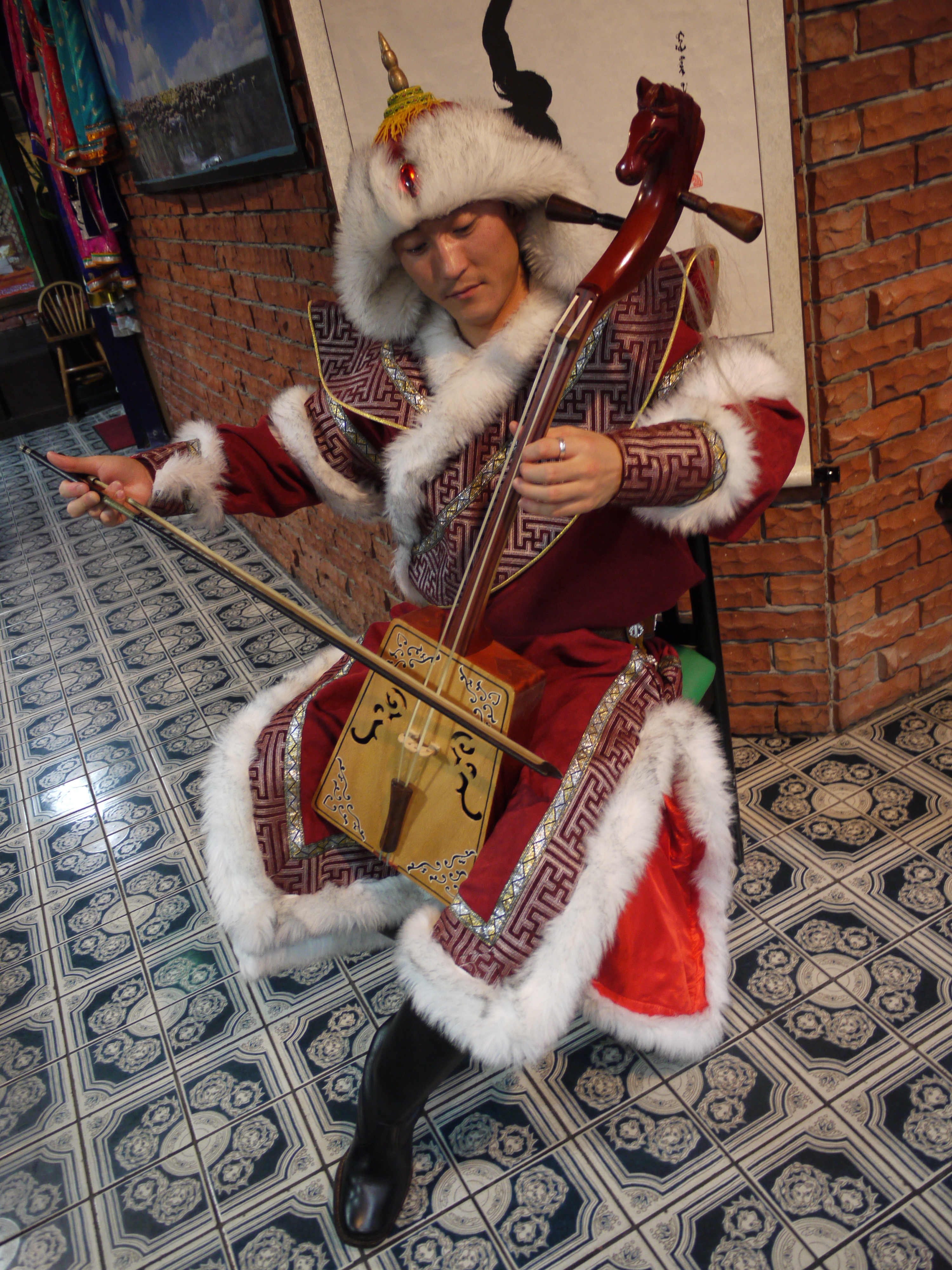 Morin khuur (Inner Mongolian style)